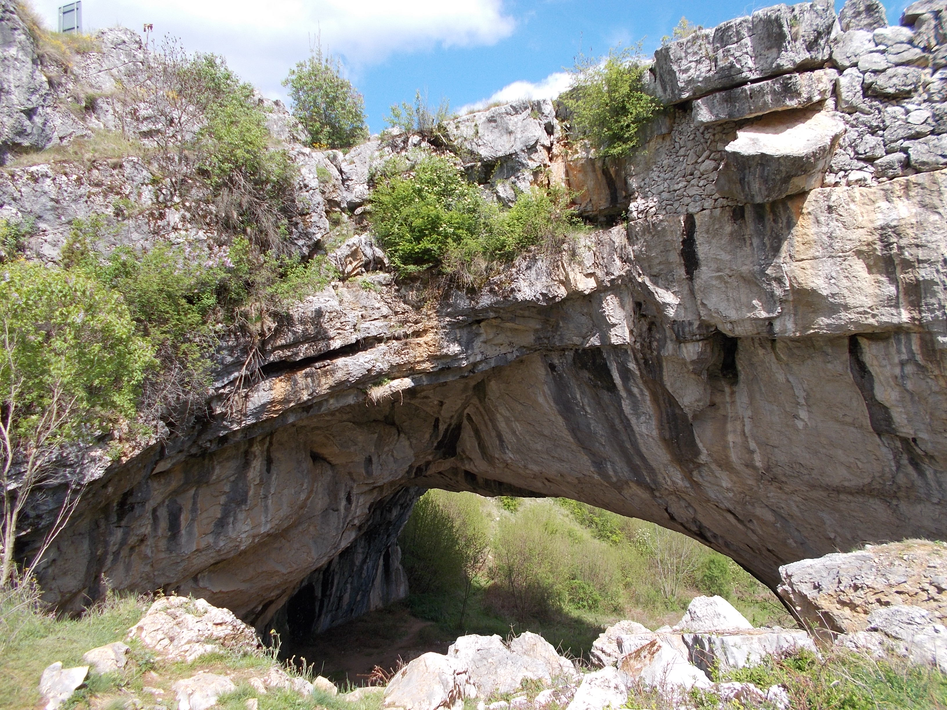 Podul lui Dumnezeu - Complexul carstic de la Ponoarele (arie protejată)